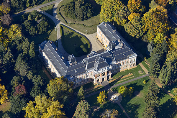 Lengyel, Apponyi-kastély - légi fotó